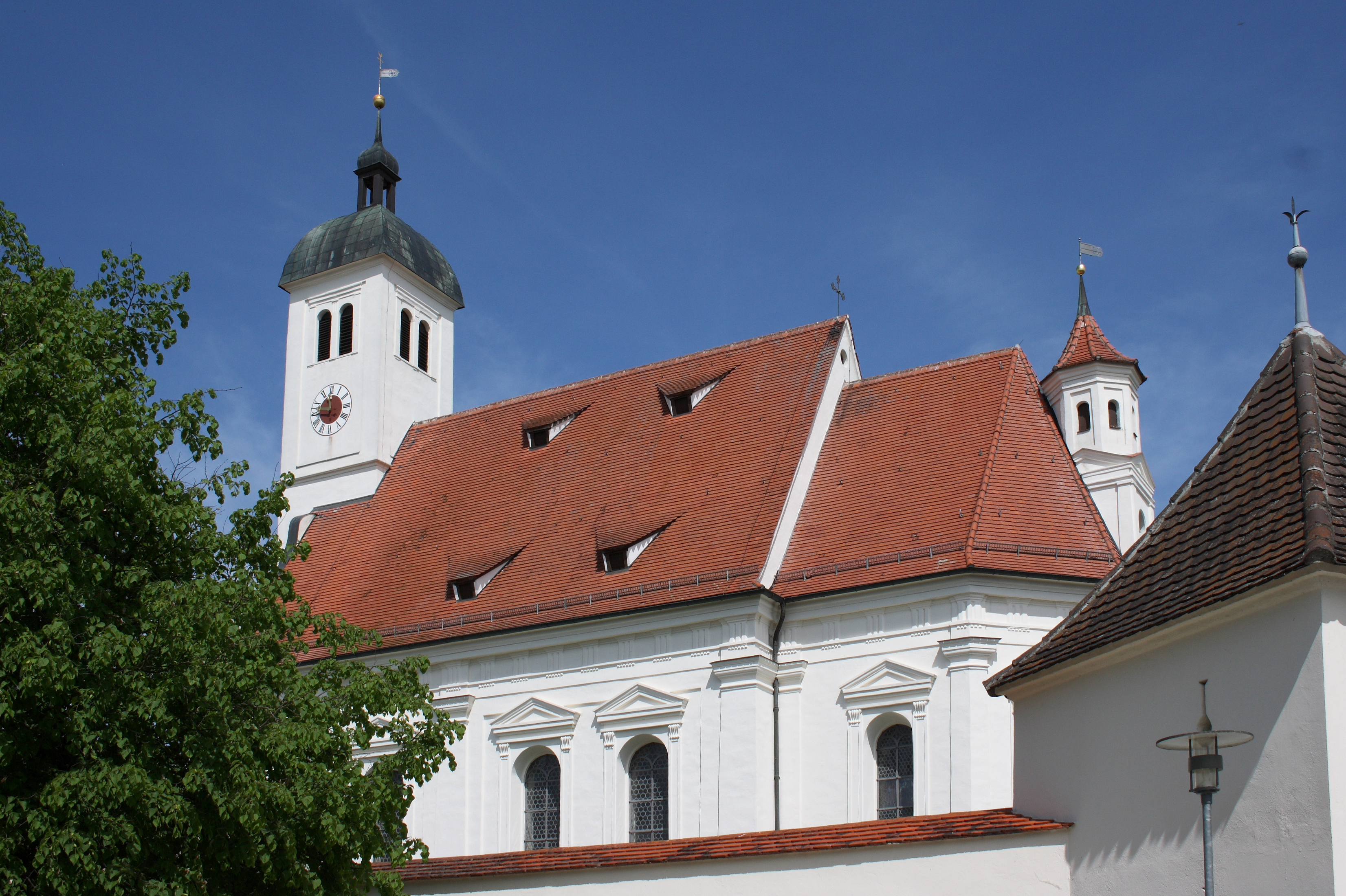 Evangelisch-lutherische Dreifaltigkeitskirche in Haunsheim, einer Gemeinde im Landkreis Dillingen an der Donau (Bayern)